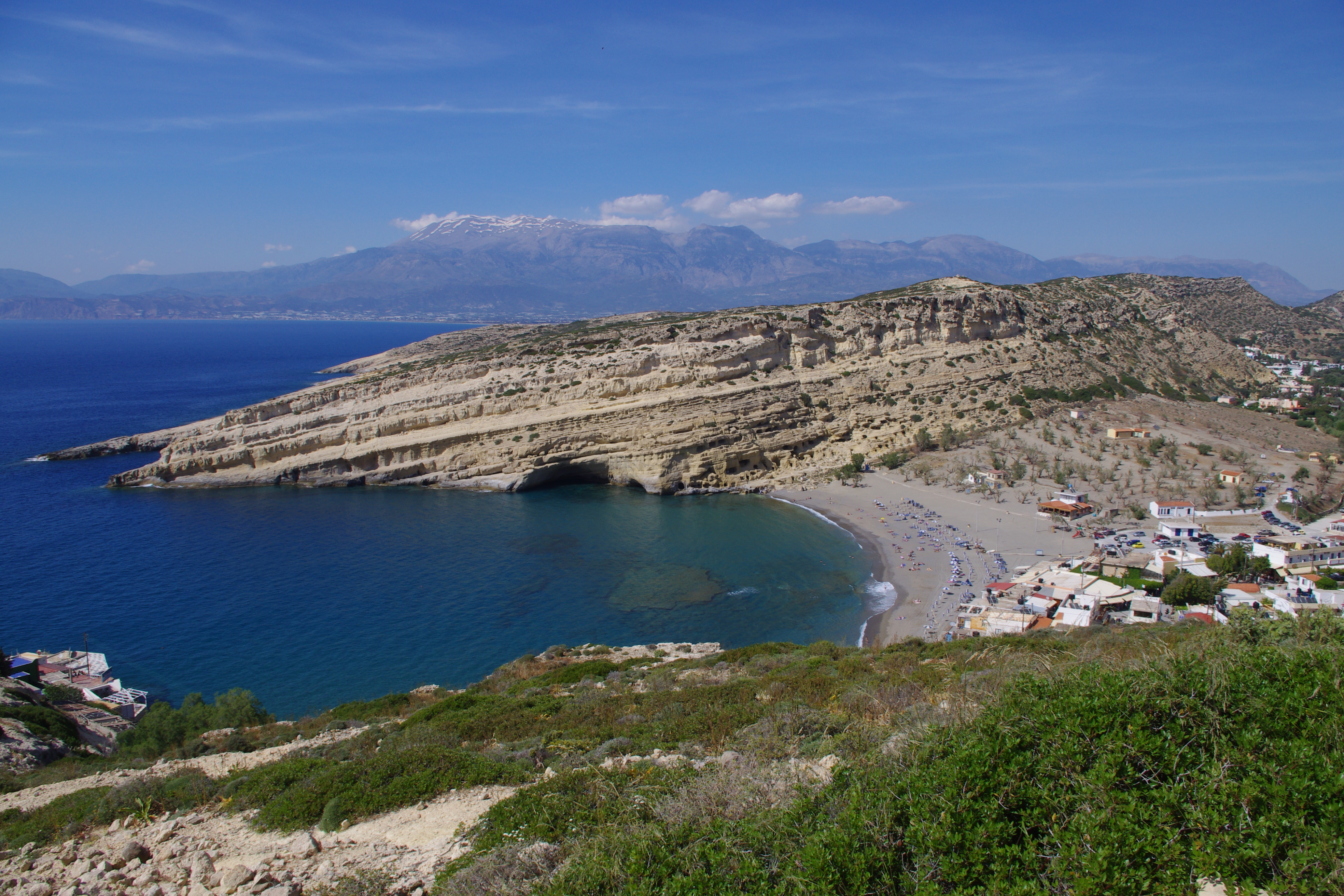 Μάταλα, με τον Ψηλορείτη στο βάθος This is a photography of Natura 2000 protected area with ID GR4310004